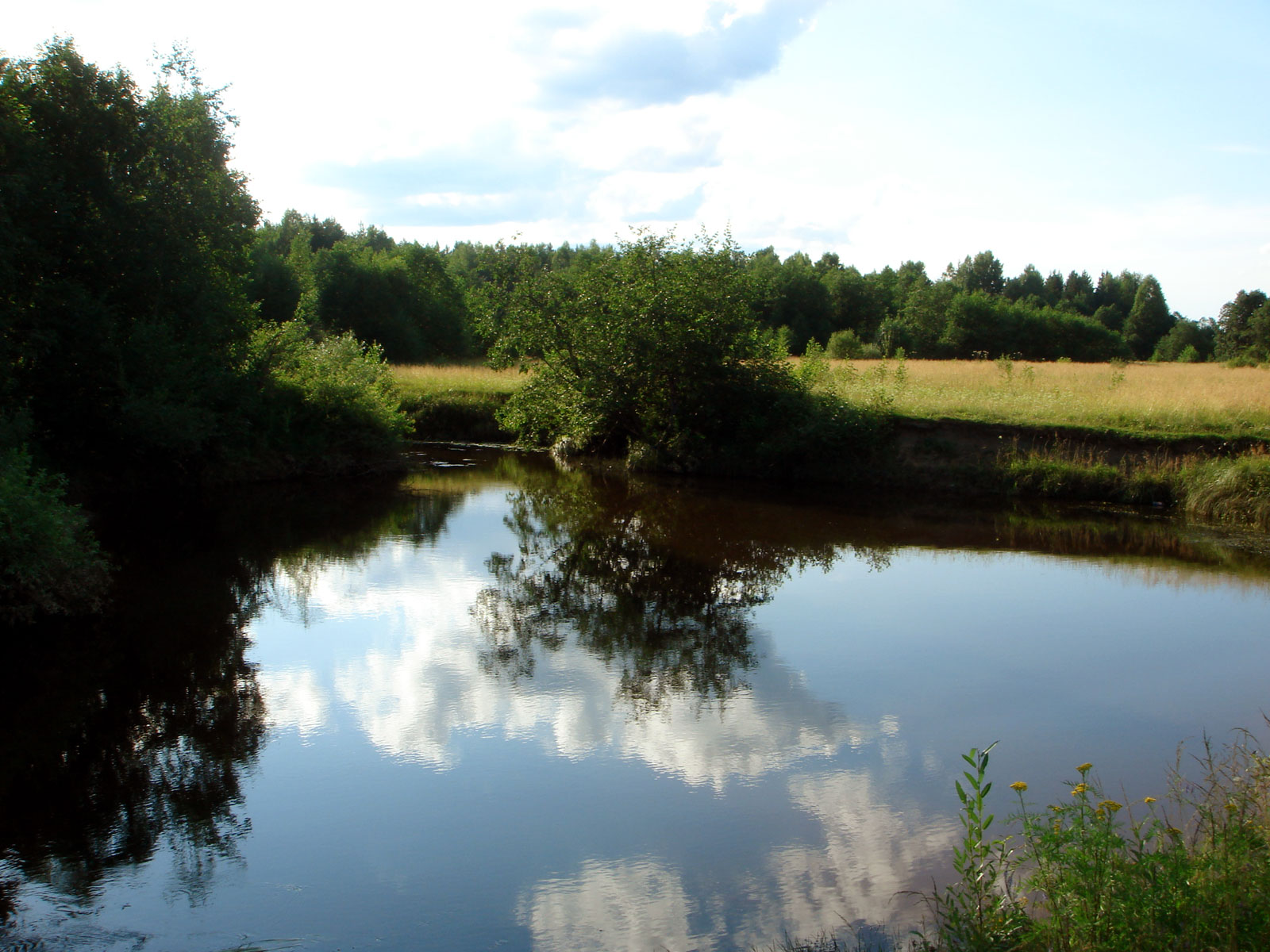 Омут на реке Пижуг.